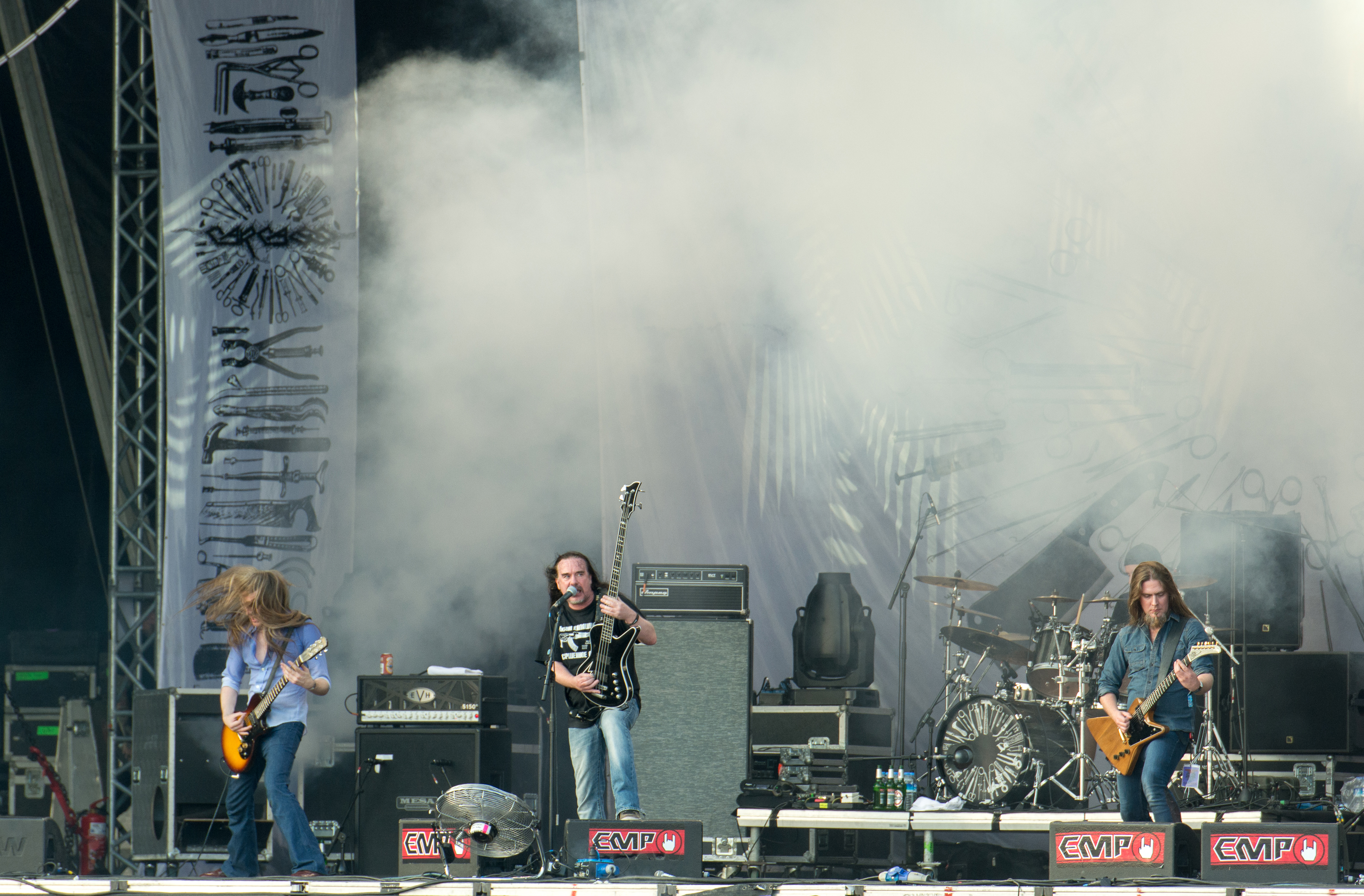 Carcass auf dem Elbriot 2016